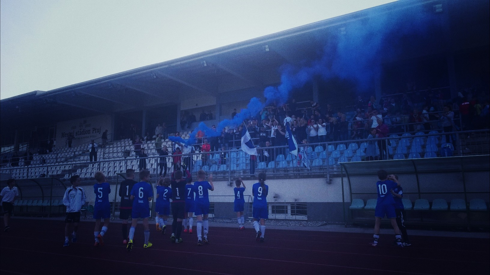 Igralci nogometne šole Drava Ptuj s svojimi navijači